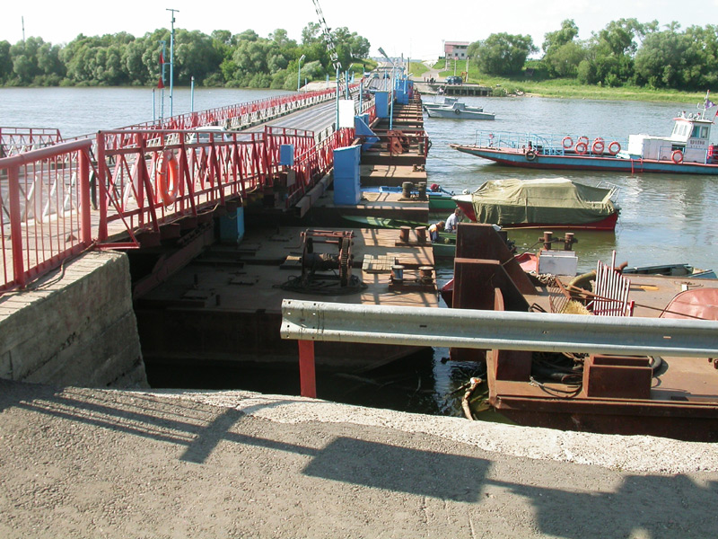 Автор - Lite